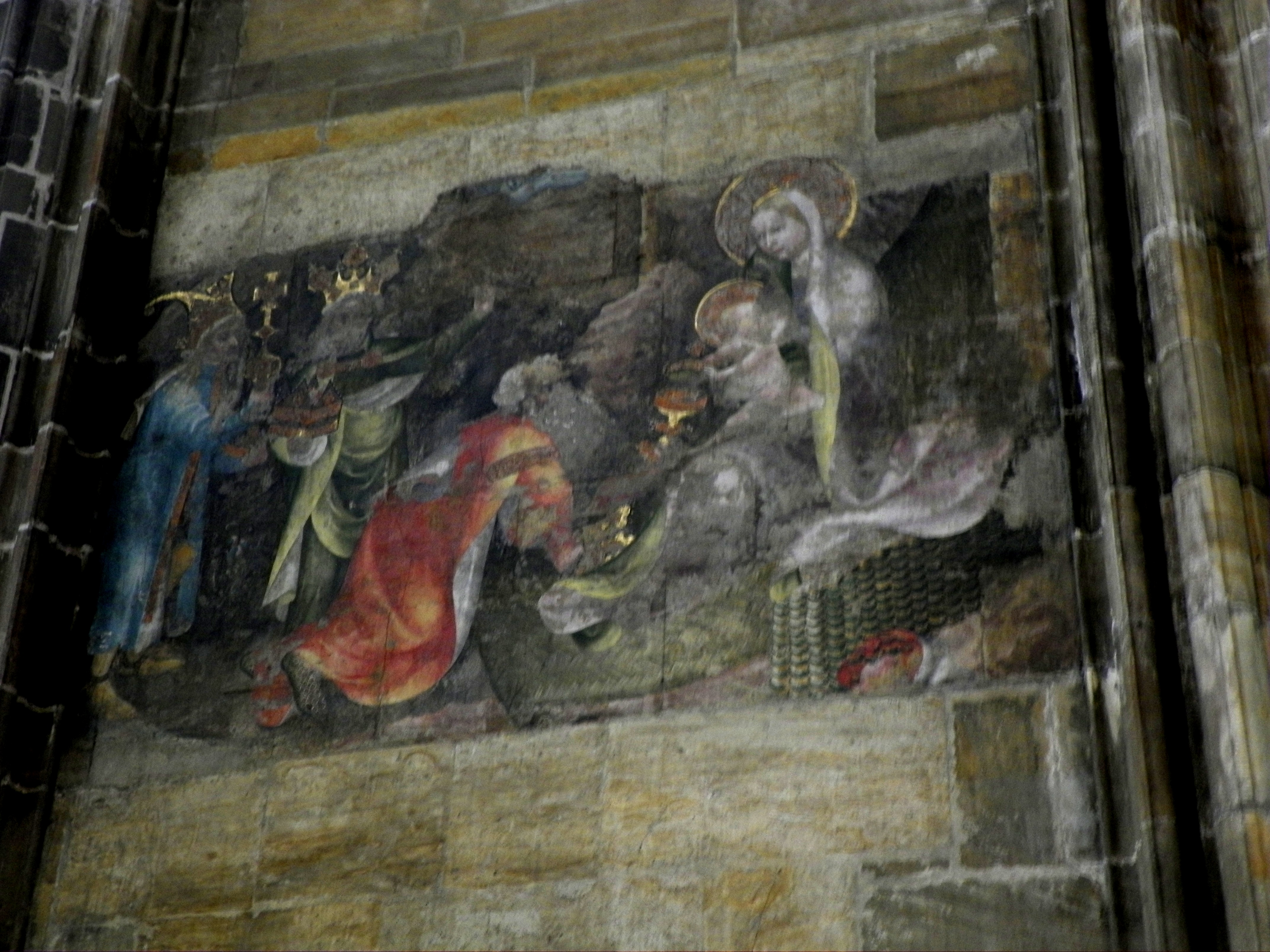 Klanění tří králů, nástěnná malba v kapli sv. Vojtěcha, sv. Doroty a sv. Ostatků, kolem roku 1370. Malíř byl obeznámený s progresivními proudy z frankovlámské oblasti.